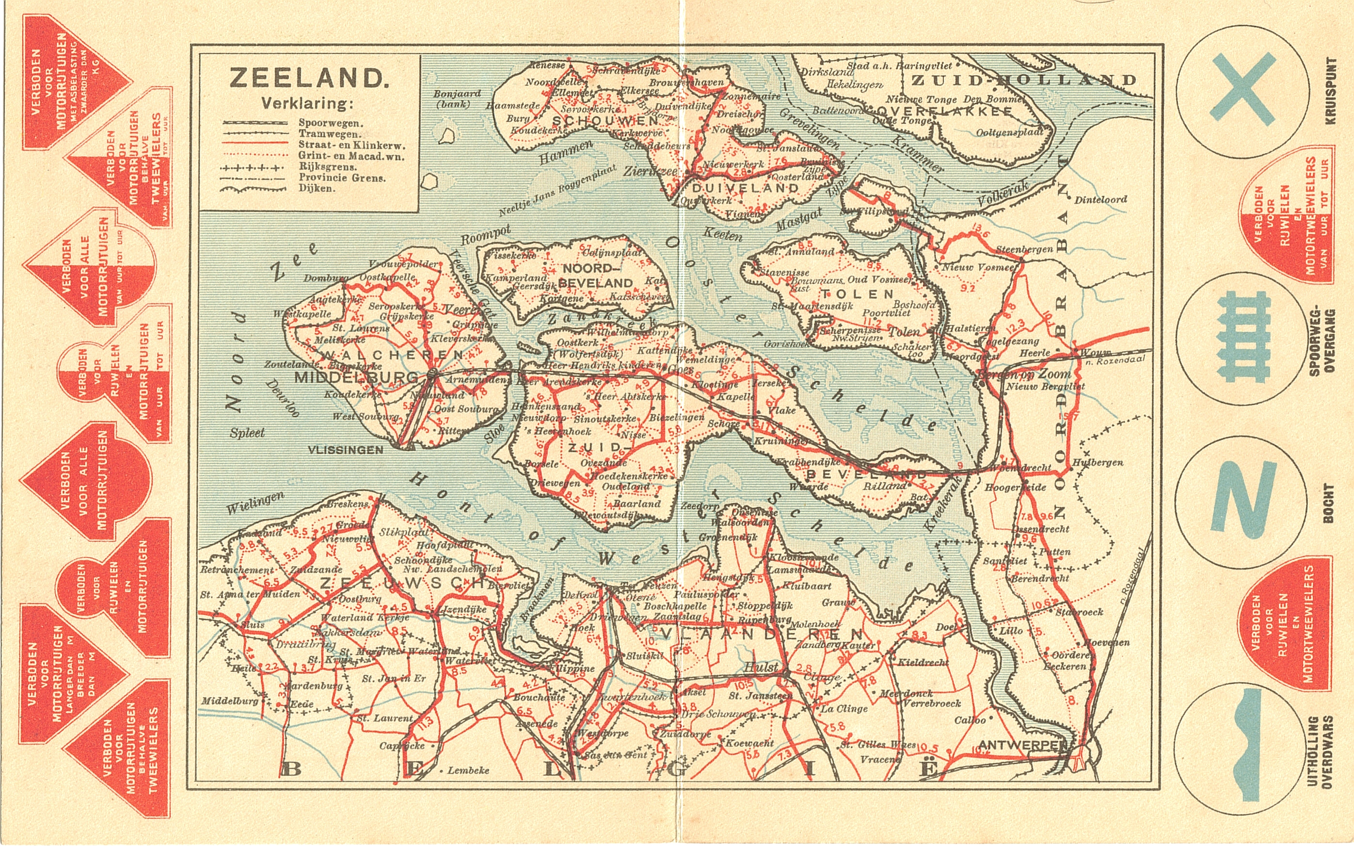 Kaartje van de provincie Zeeland